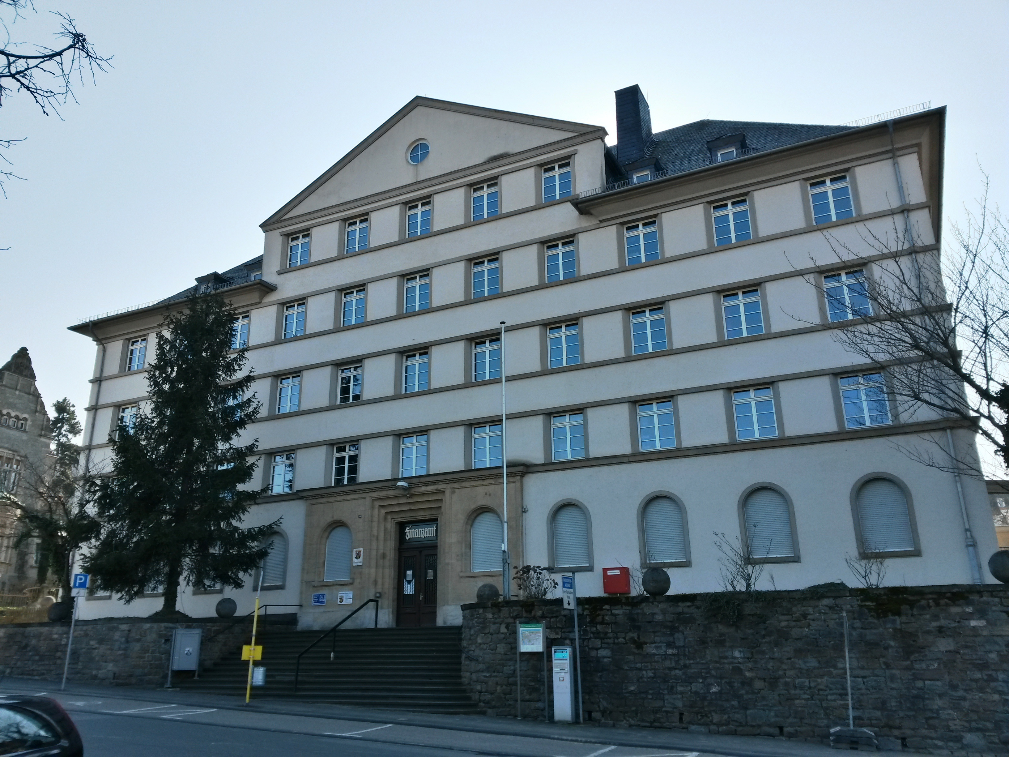 Finanzamt in Bingen am Rhein, Rochusallee 10: viergeschossiger klassizierender Walmdachbau, 1927, Architekt Friedrich Lauer, Darmstadt. Ansicht von Norden.